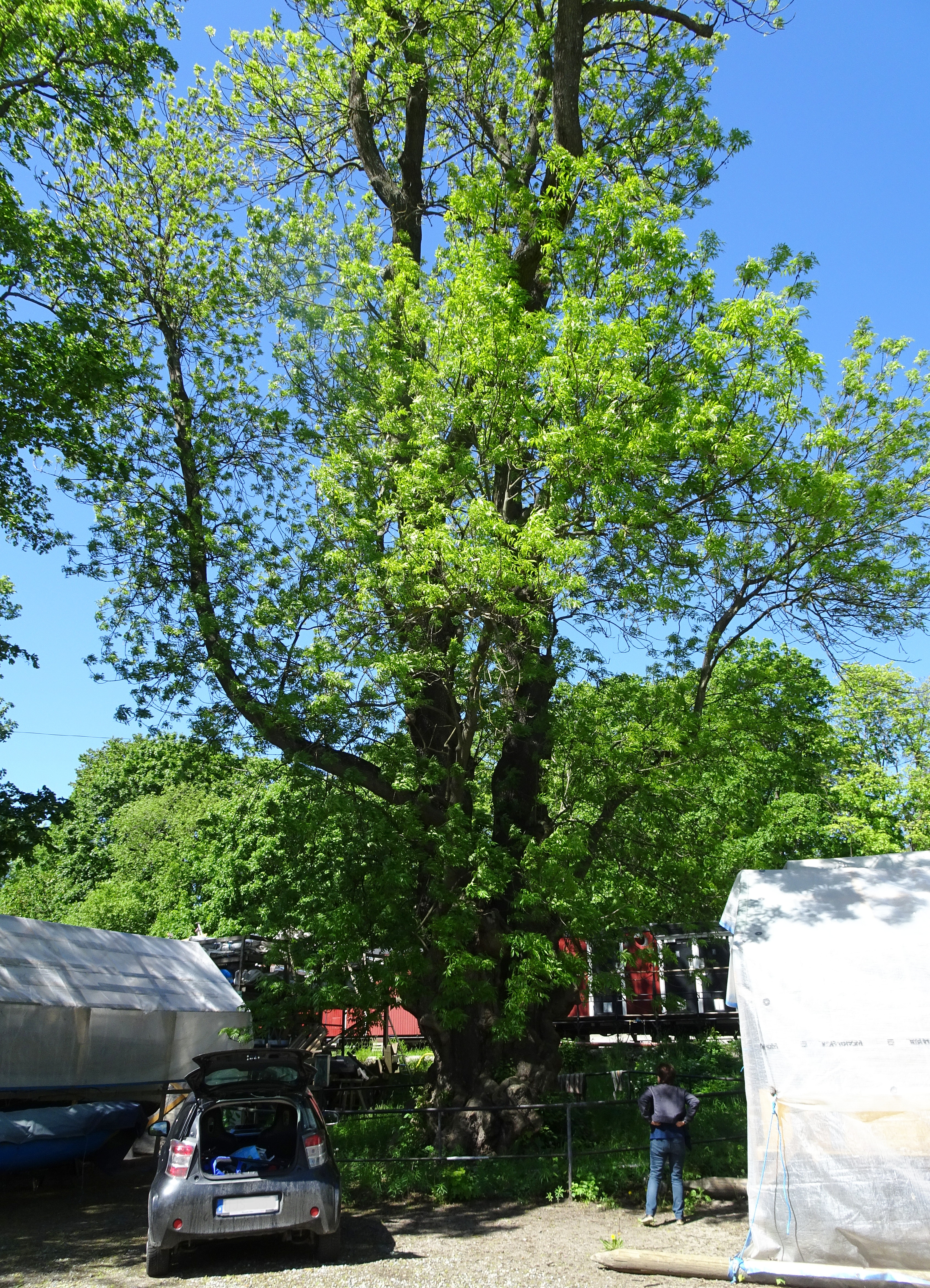 Valk-asken på Långholmen. Trädet uppmärksammades redan på Linnés 1700-tal.